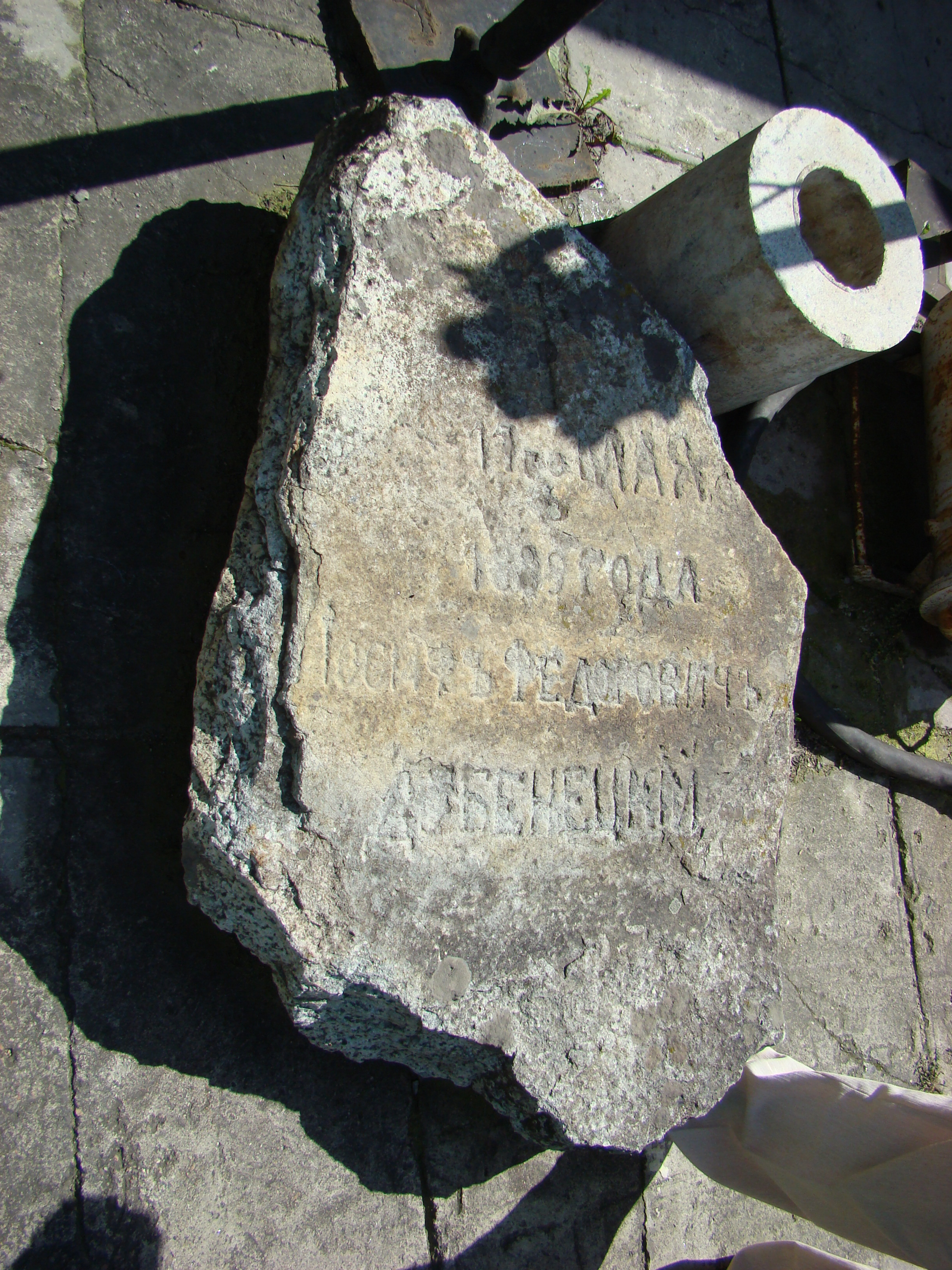 Płyta grobowa Jana (Józefa?) Fedorowicza Dubienieckiego zmarłego 11 maja 1889 roku (polskiego zesłańca?), ocalała z cmentarza w Zmieinogorsku. Cmentarz został zniszczony w latach 50-tych, a nagrobki użyte przez okoliczną ludność do budowy fundamentów domów. Muzeum w Zmieinogorsku, Kraj Ałtajski, Rosja.